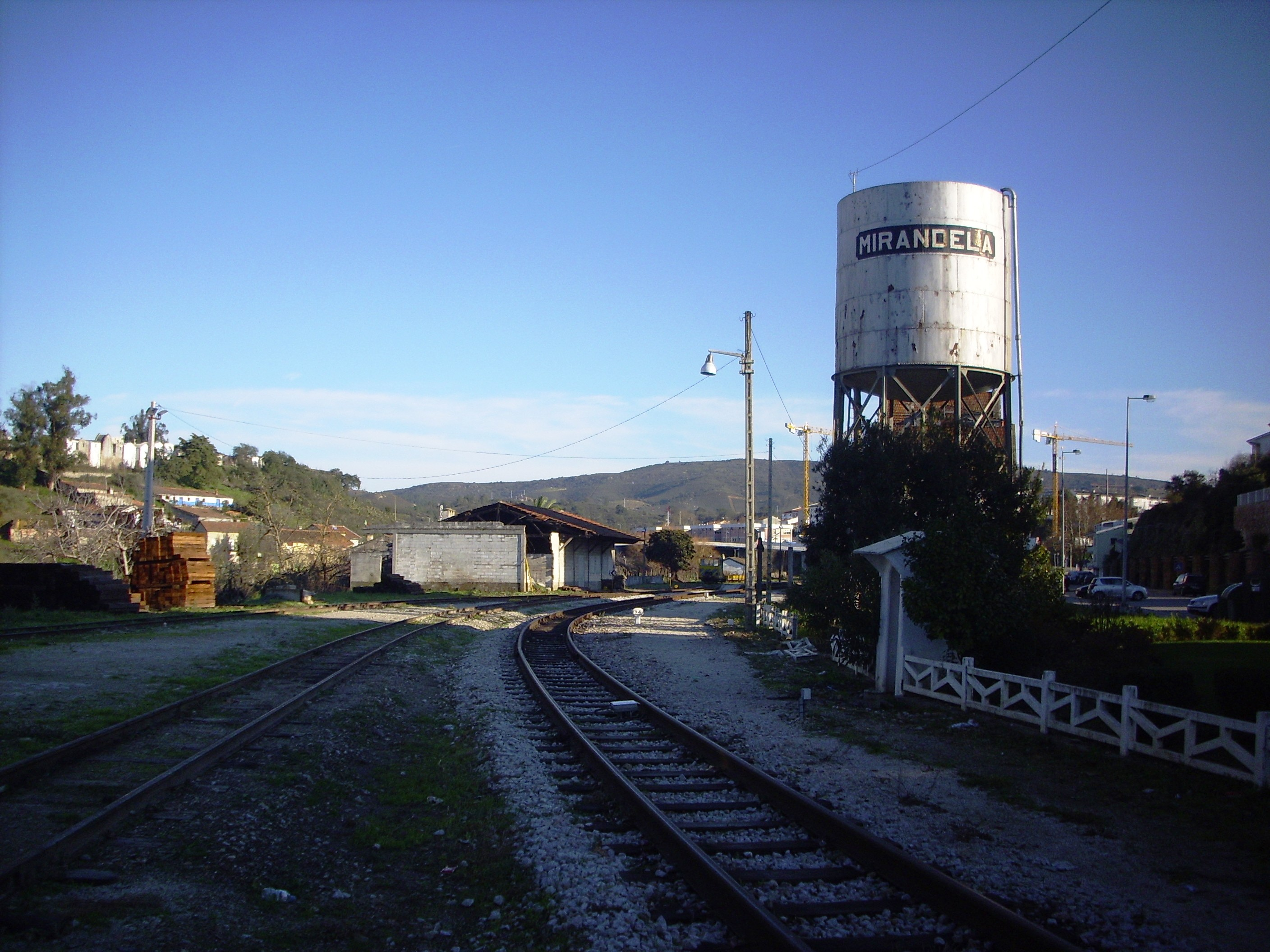 Mirandela